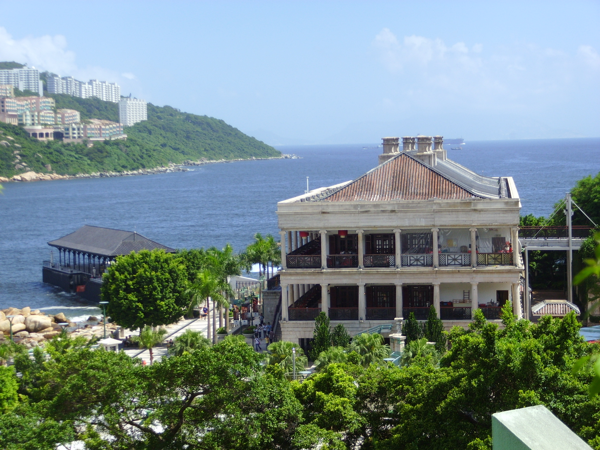 由赤柱廣場高處攝向美利樓